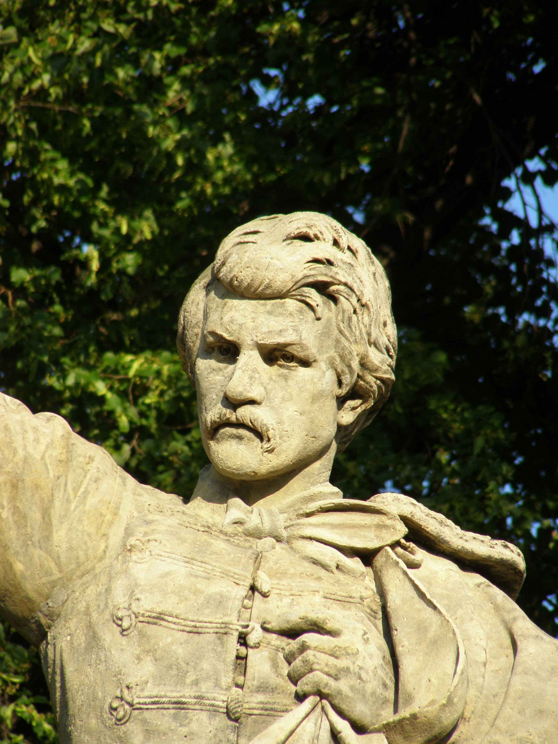 Česky: Kutná Hora, část Kutná Hora-Vnitřní Město, Havlíčkovo náměstí, pomník Karla Havlíčka Borovského